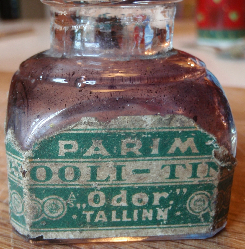 Klaasist tindipott, millel silt kirjaga "Parim Kooli-Tint AS Odor Tallinn"